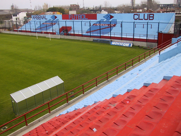 Estadio Arsenal FC Estadio del Arsenal Fútbol Club